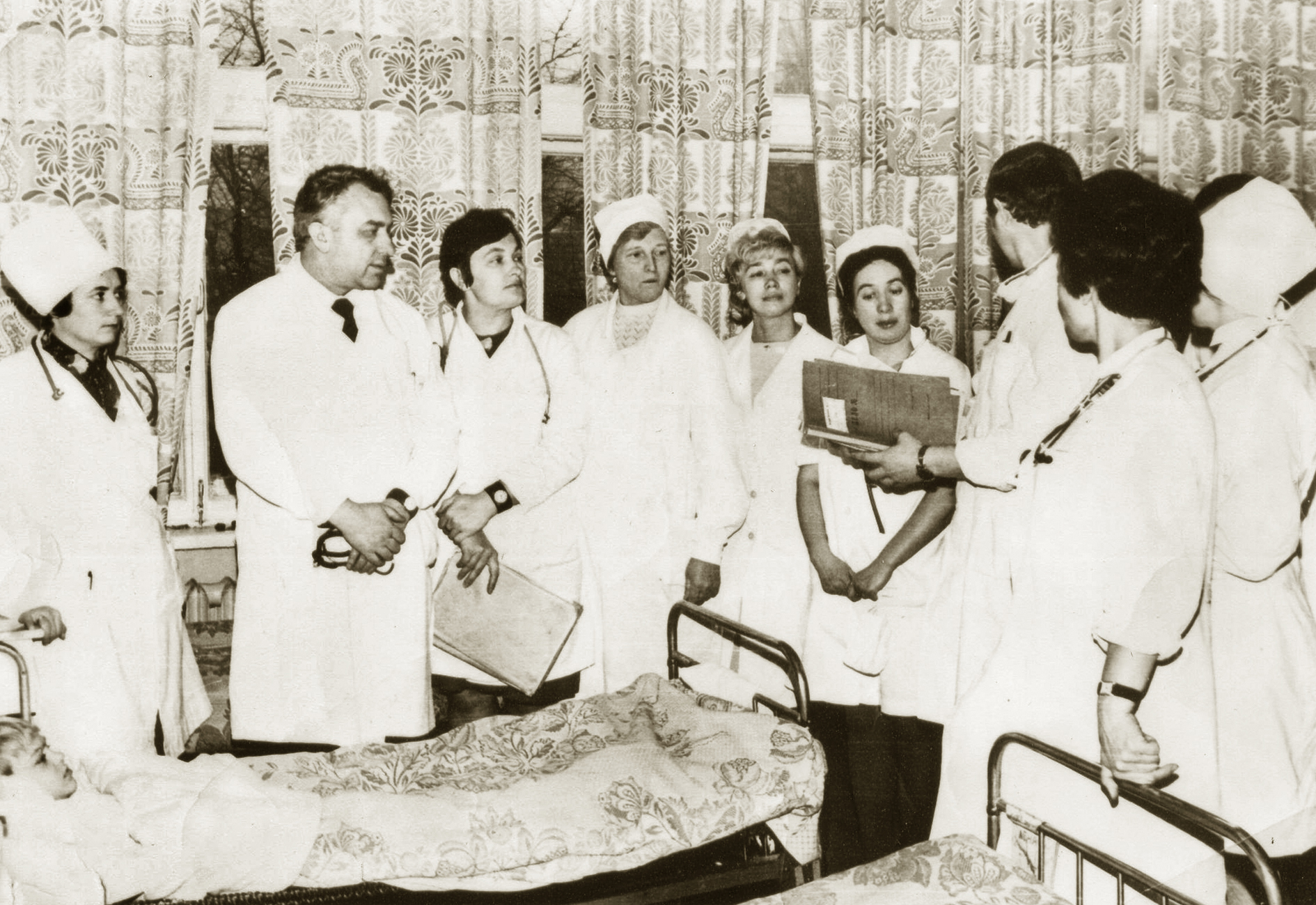 Обход профессор И. М. Воронцов в клинике кафедры детских болезней № 3.